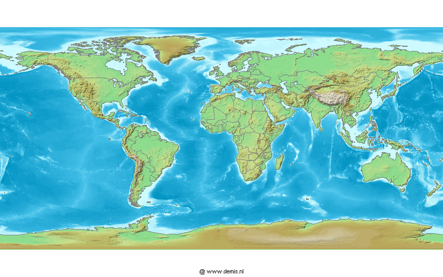 Weltkarte Demis-Mapserver